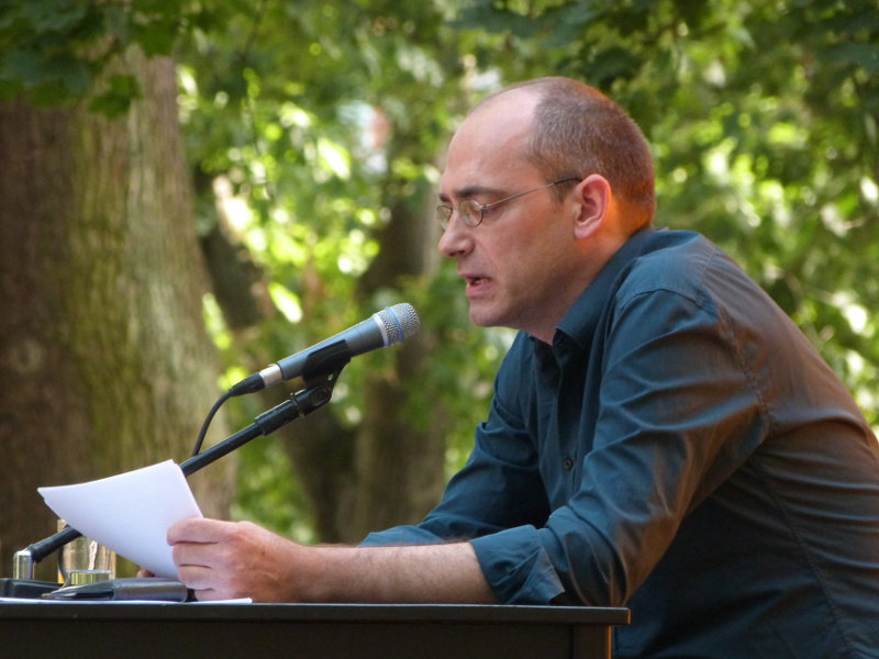 German writer Rainer Merkel at the Erlanger Poetenfest 2012